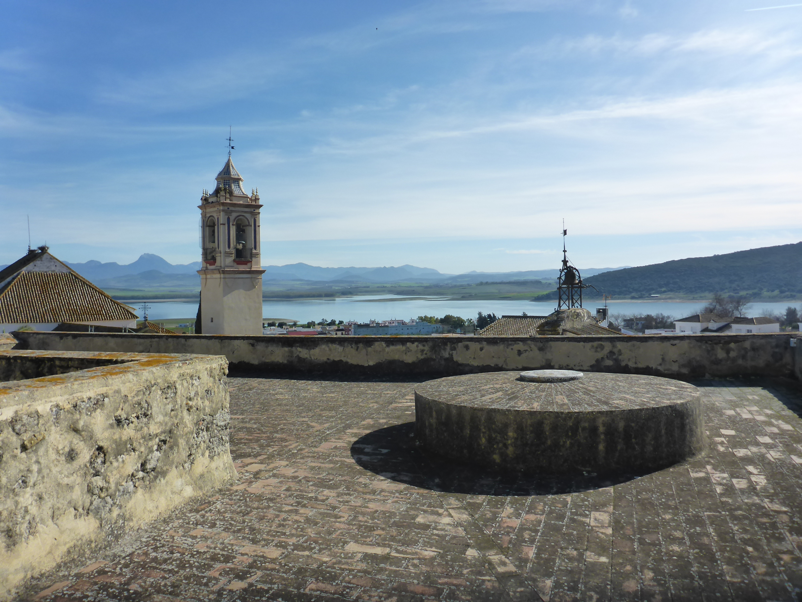 Jardines del Palacio de los Enríquez de Ribera en Bornos (Andalucía, España)